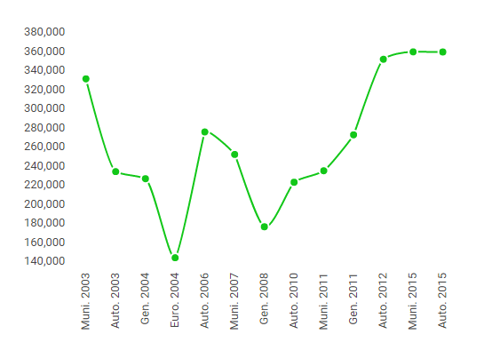 Gráfico que muestra los resultados de la coalición de izquierdas catalana desde el año 2003